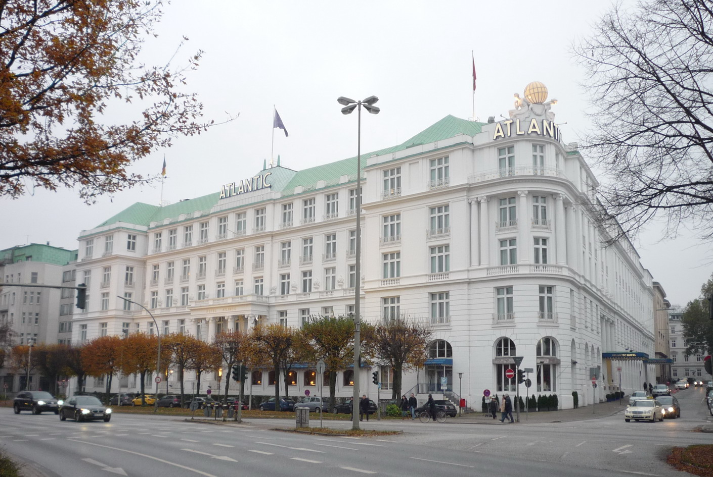 Hamburg Nobelhotel Atlantic an der Außenalster